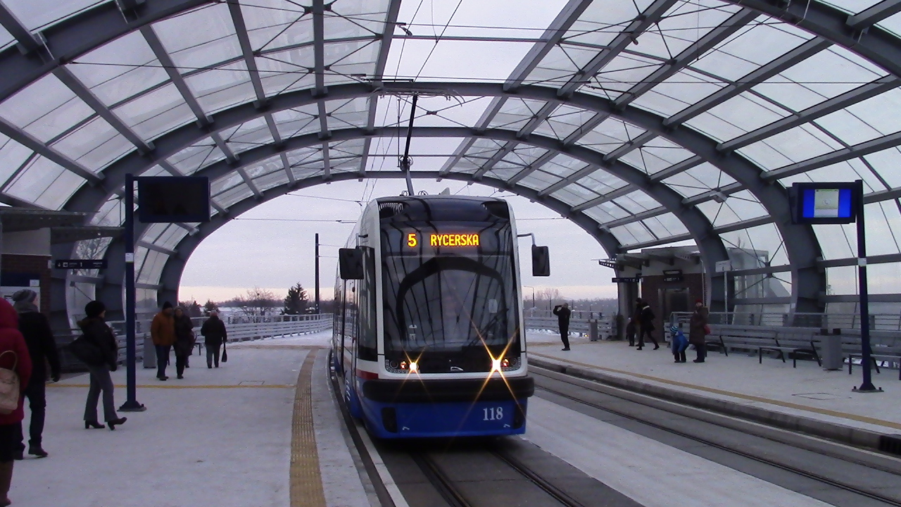 Pesa 122NaB Swing